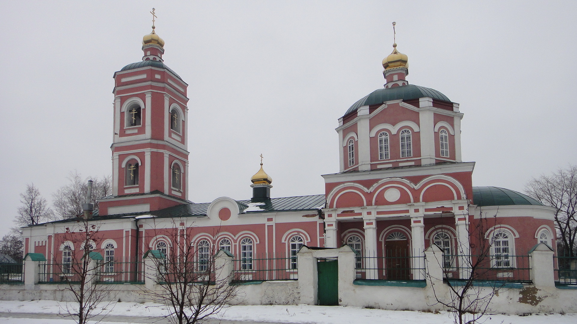 Георгиевская церковь (Липецкая область, Данков, Кирова улица, 2)